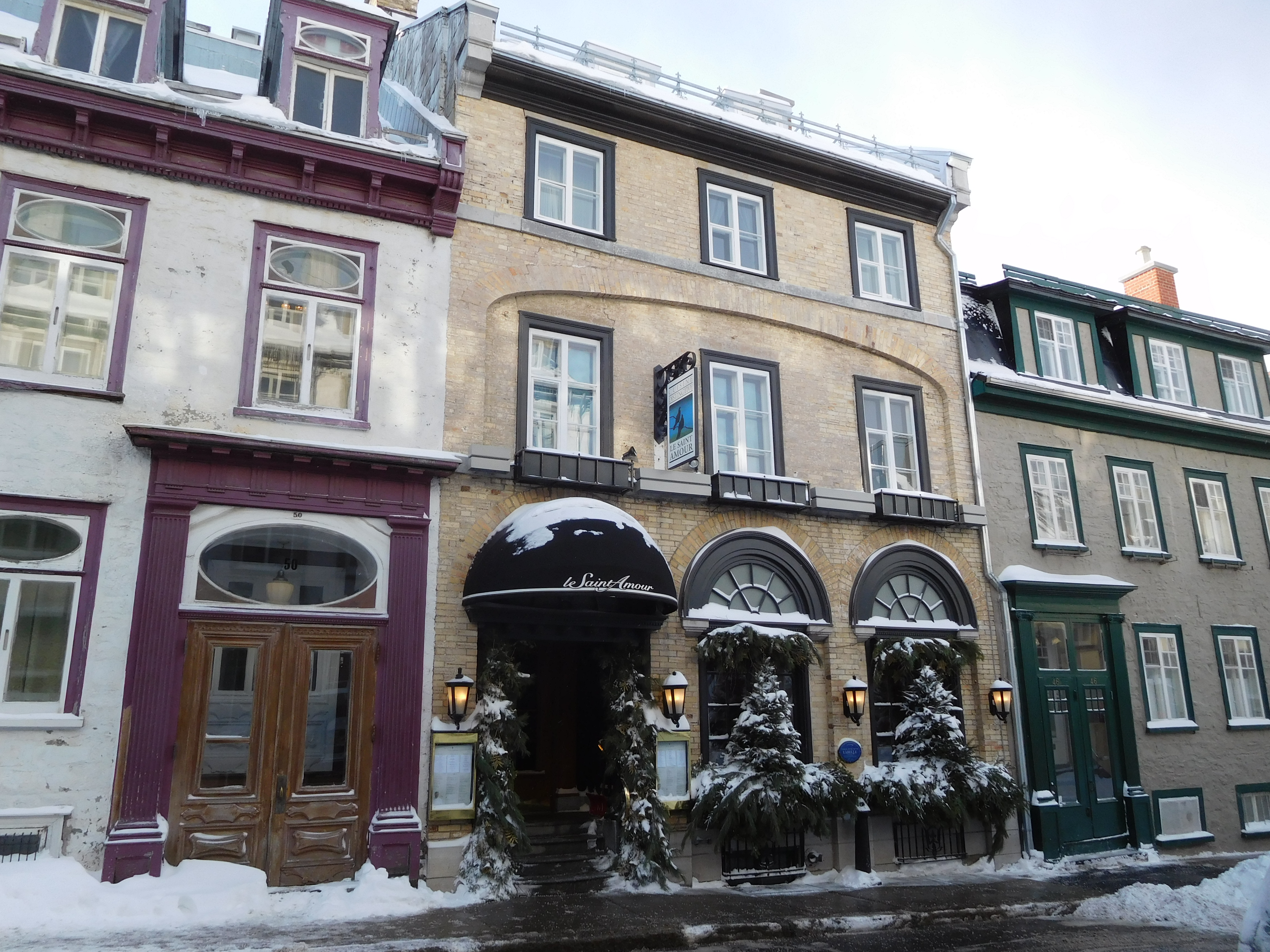 Maison Laughlan-Thomas-McPherson Le Saint-Amour, 48, rue Sainte-Ursule, Québec